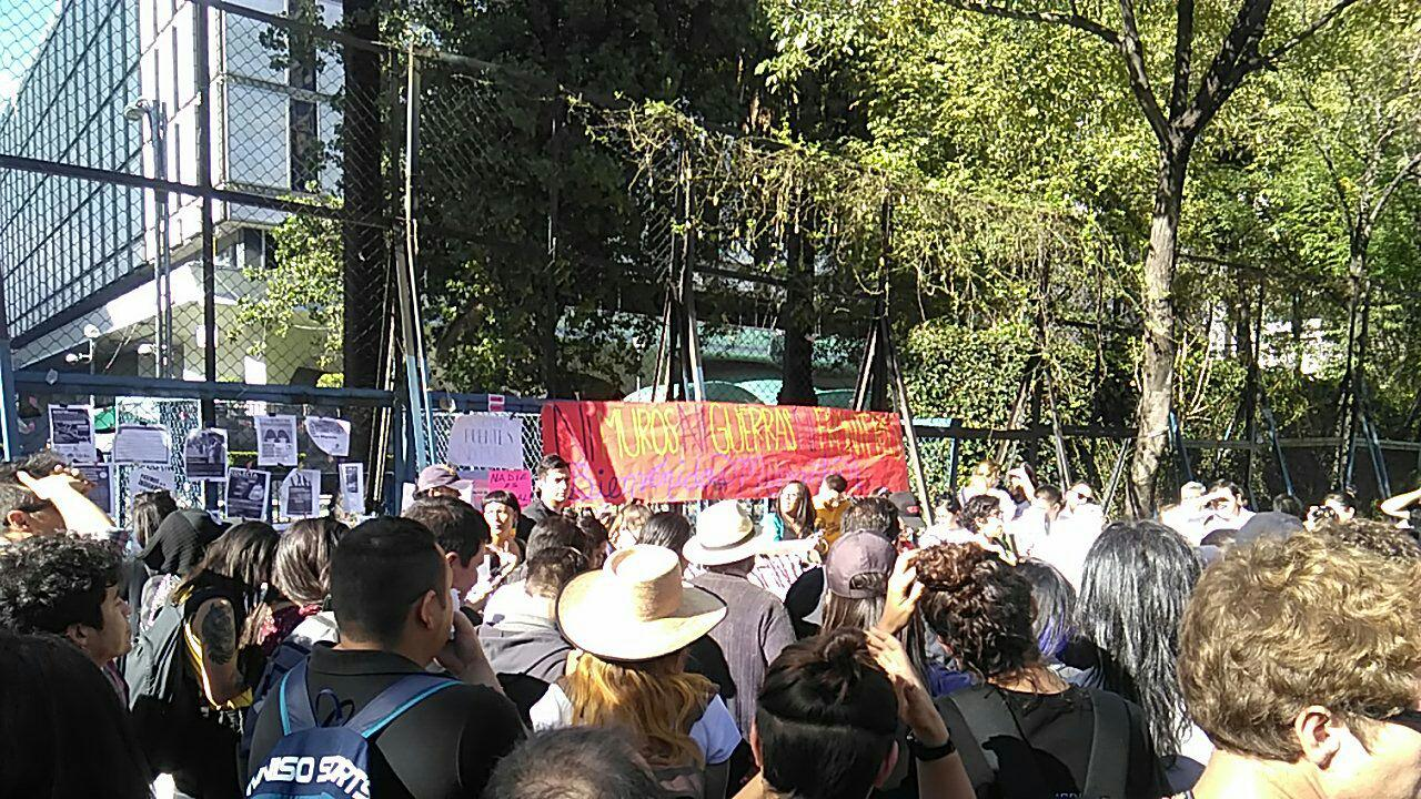 Protesta en frente de la embajada norteamericana en Ciudad de México por los derechos de libre circulación de la Caravana Migrante